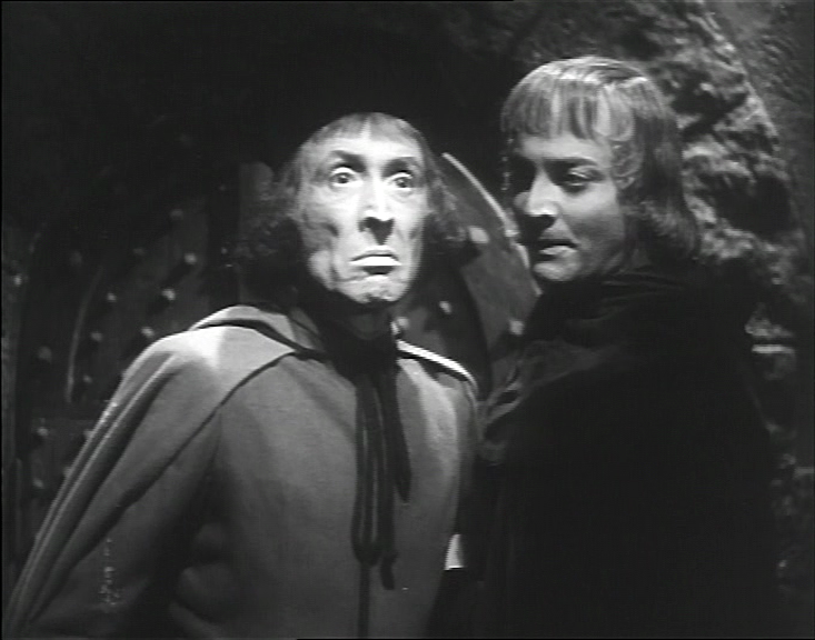 Screenshot del film La cena delle beffe (1941) di Alessandro Blasetti.